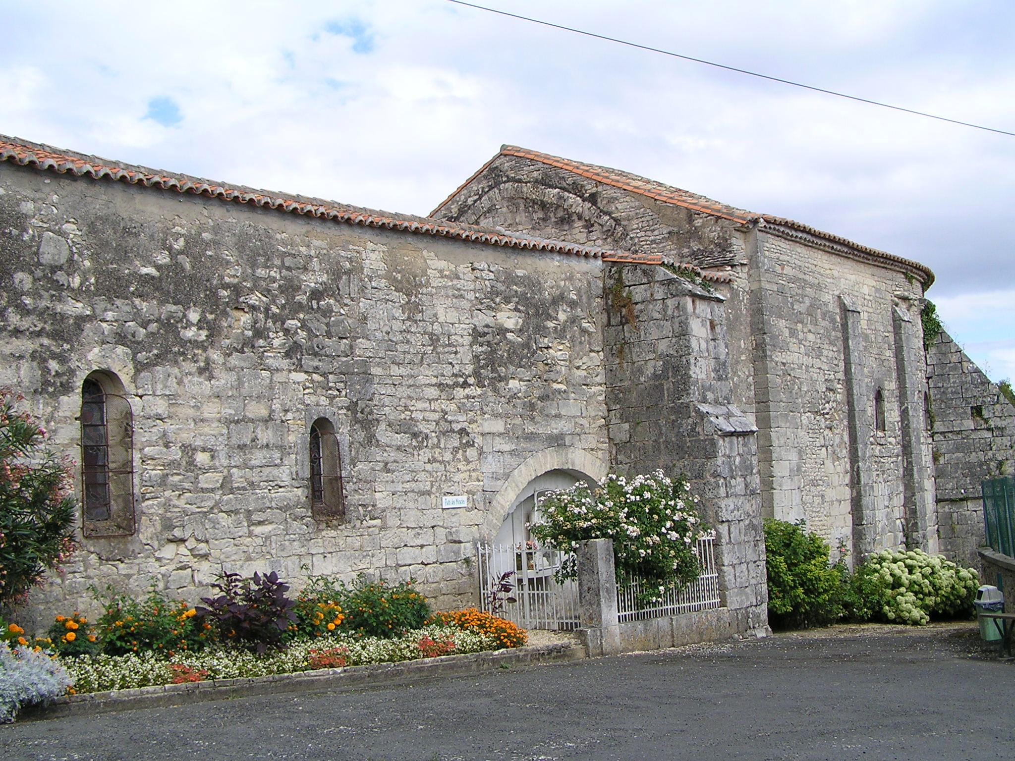 église de Xambes, Charente, France